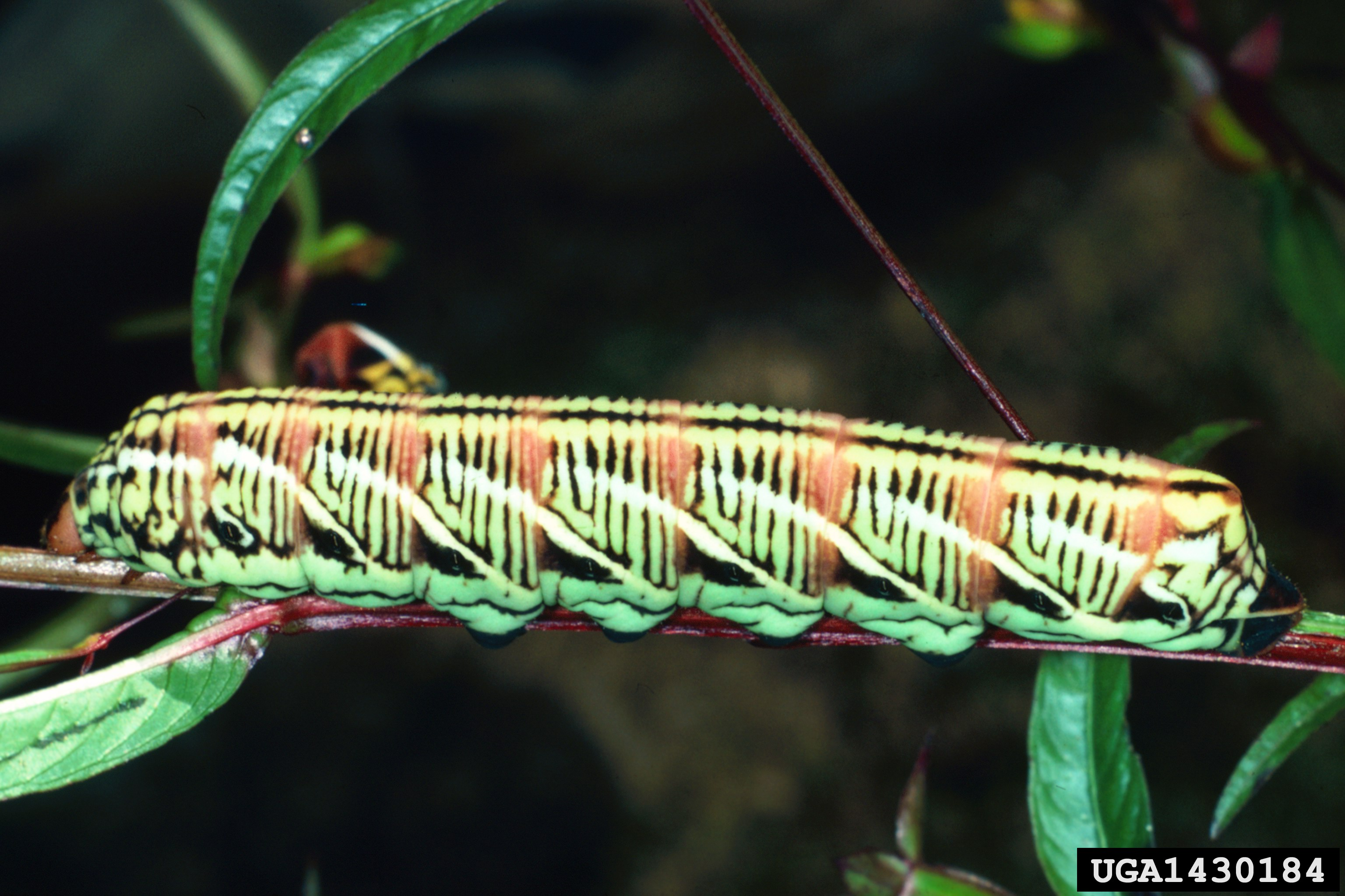 Eumorpha fasciata, larva